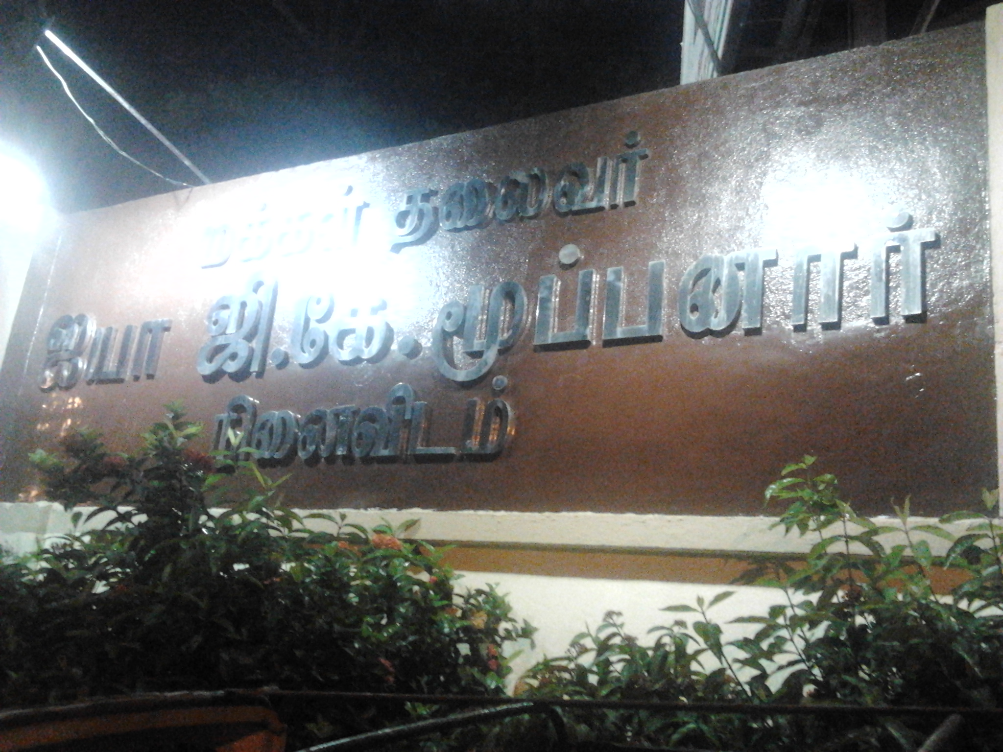 g karuppaiah moopanaar memorial , Chennai